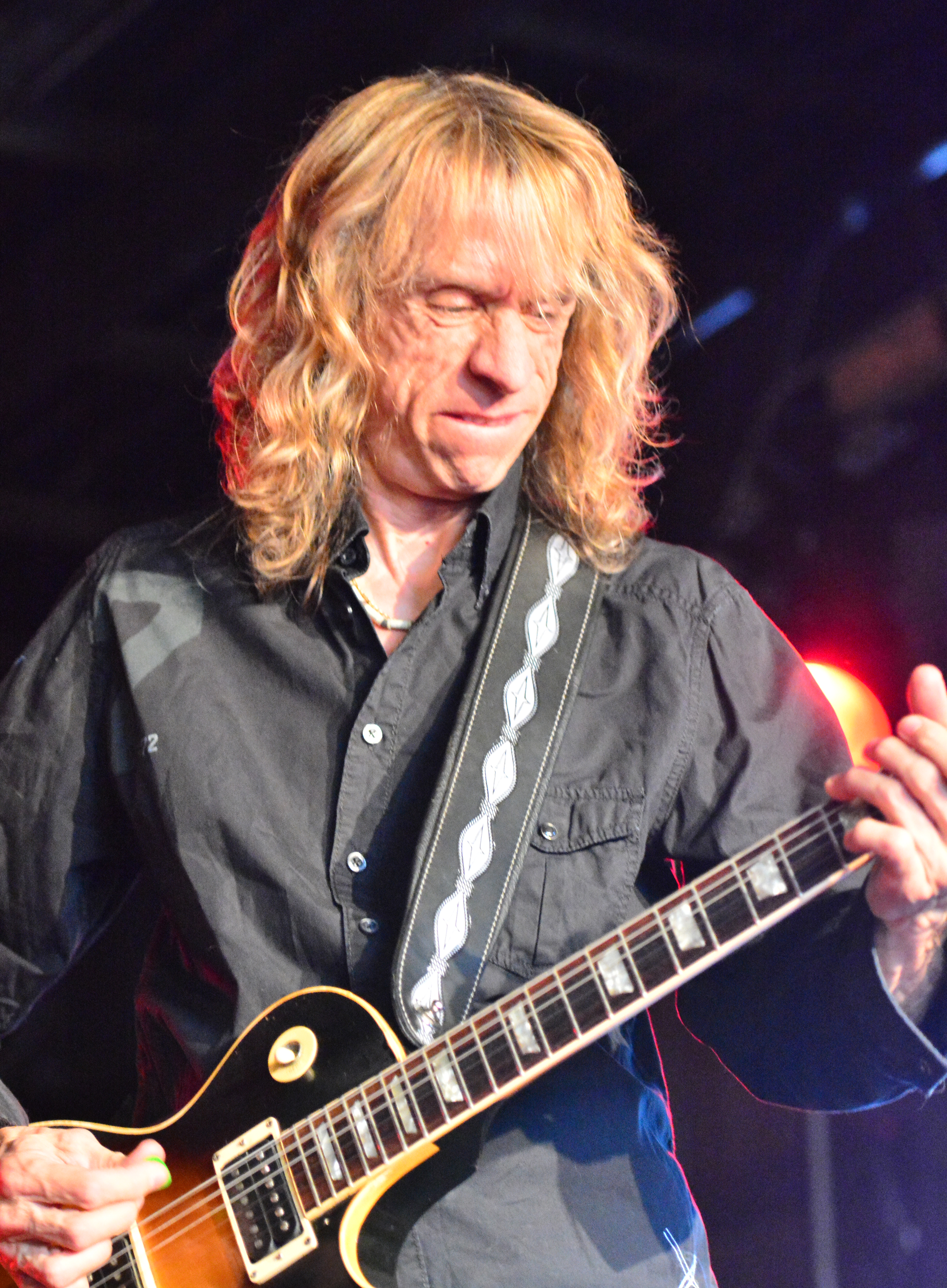 Brain Tatler von Diamond Head beim Headbangers Open Air 2014